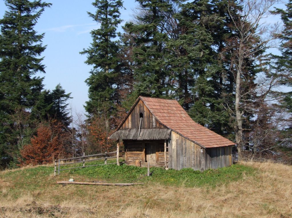 Szałas na polanie Cerla Hanulowa w Gorcach